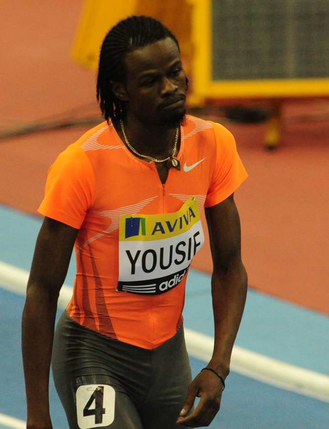 Rabah Yousif AVIVA GRAND PRIX - Birmingham